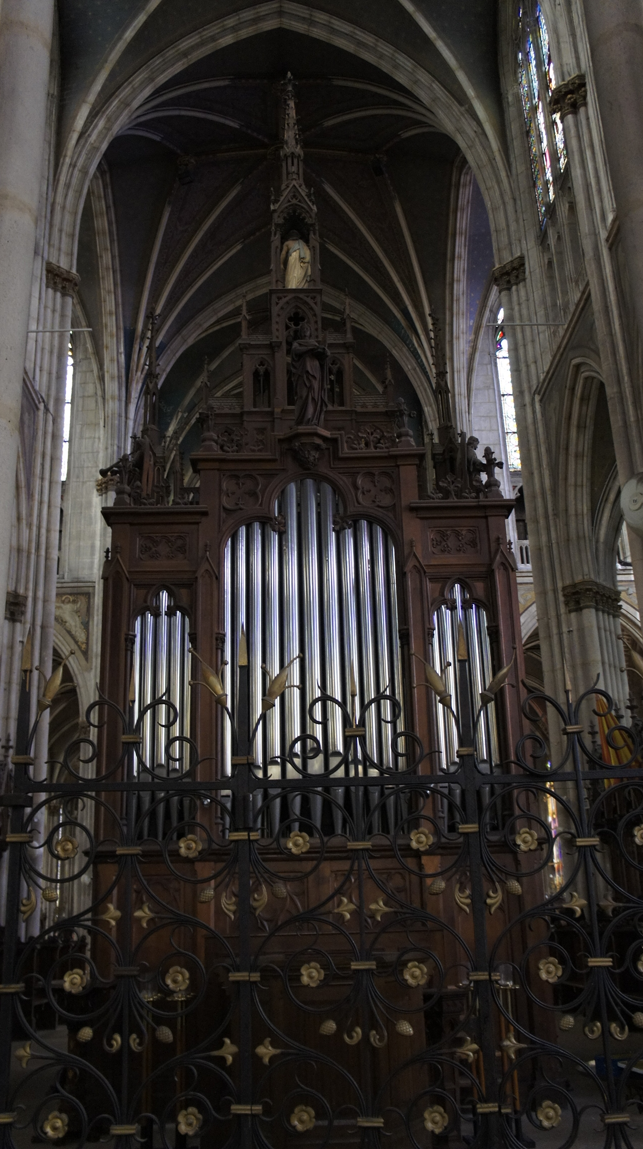 Détail de l'intérieur de la Basilique Saint-Epvre de Nancy .